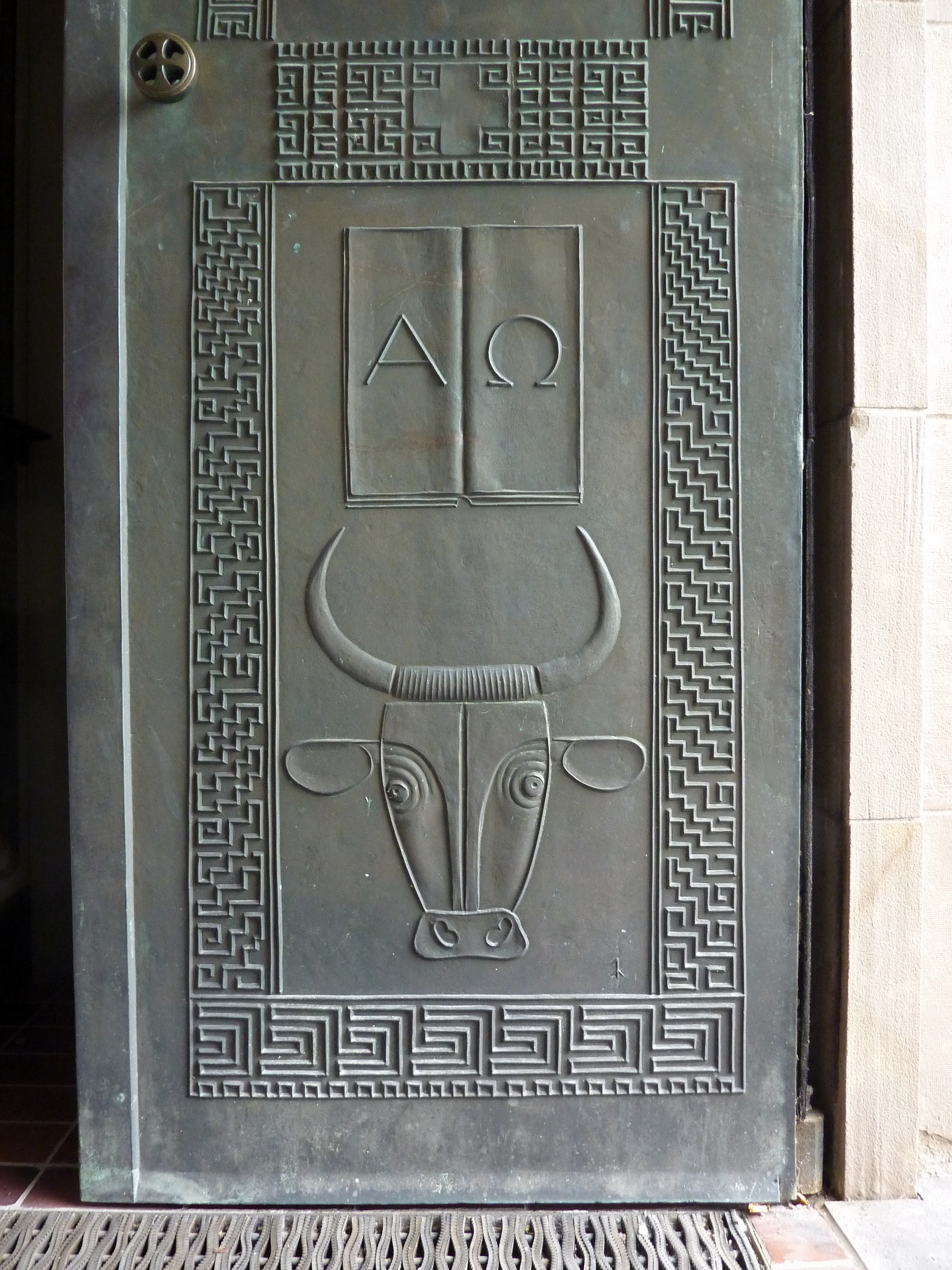 Evangelische Nikolaikirche auf dem Siegberg in Siegen/Westfalen: Stierfresko am Hauptportal.